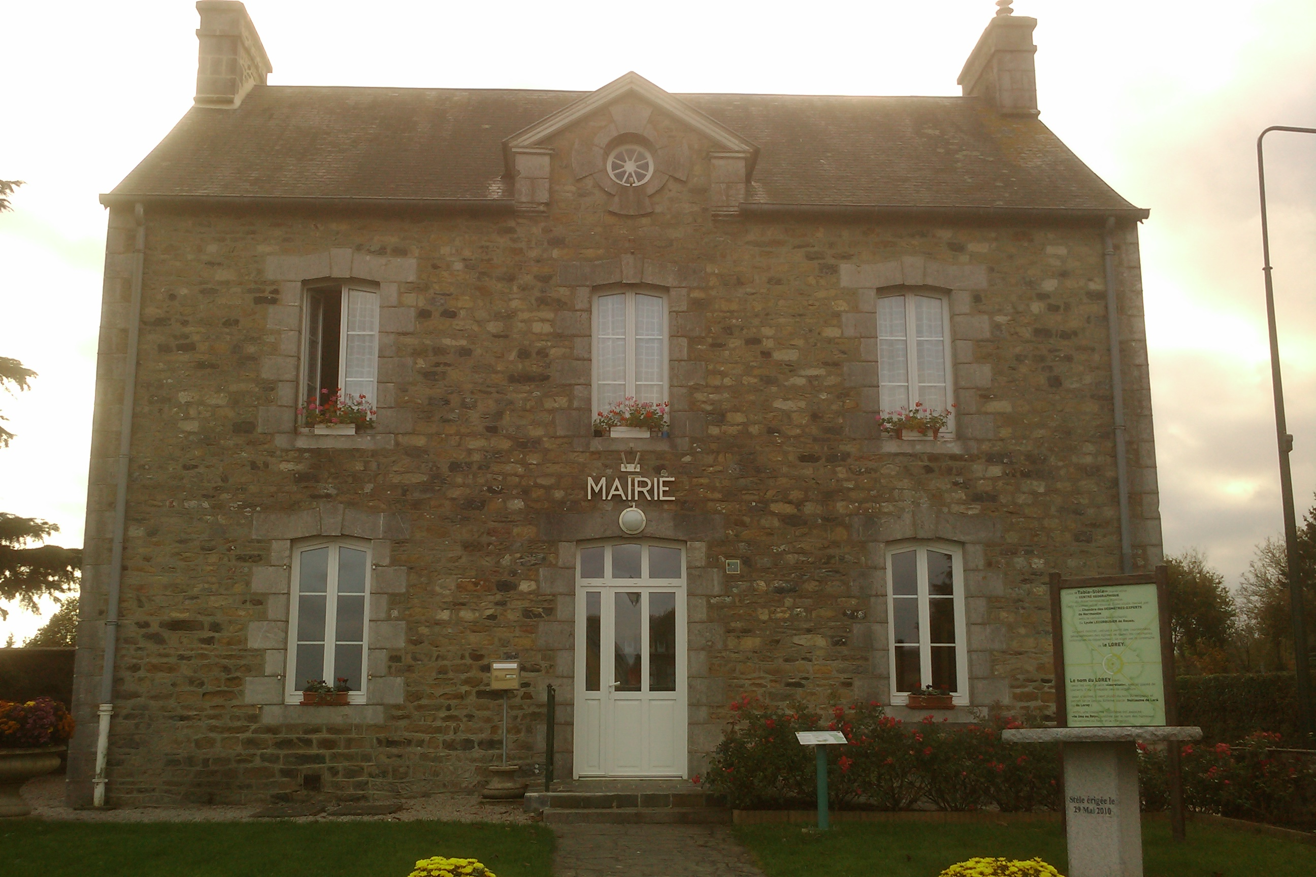 Le Lorey